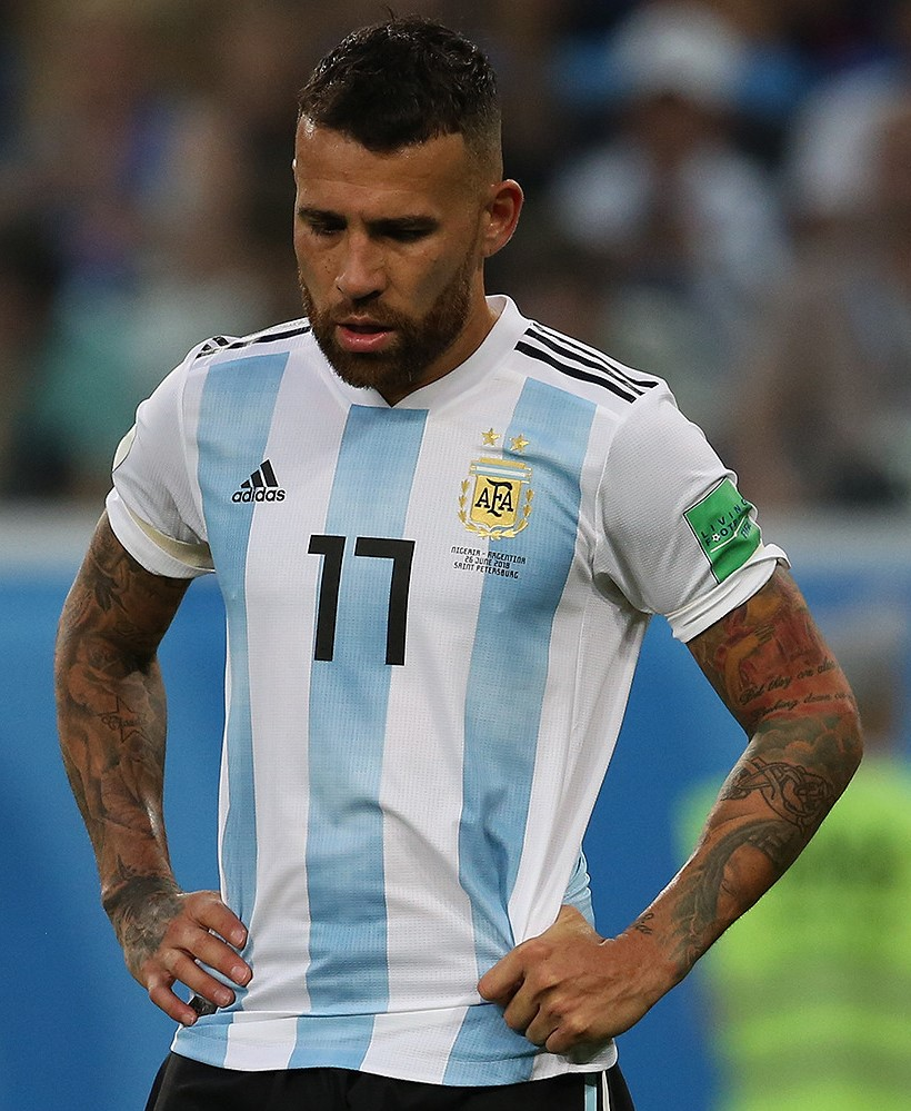 Гол Рохо в концовке выводит Аргентину в плей-офф чемпионата мира